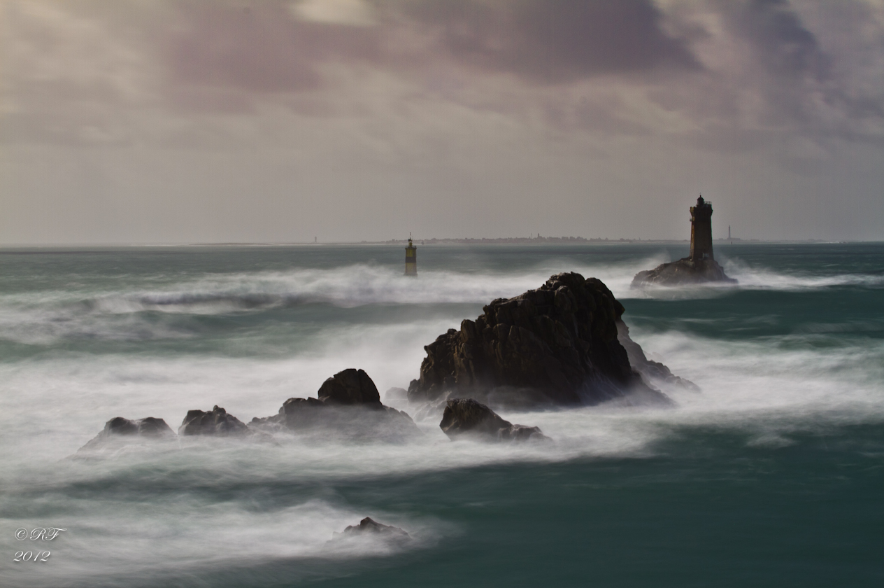 Ca fume à la Vieille